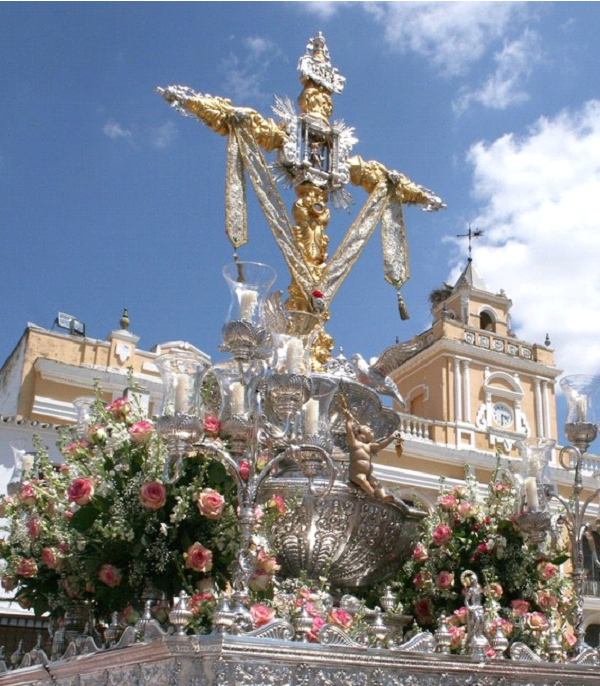 Actual madero